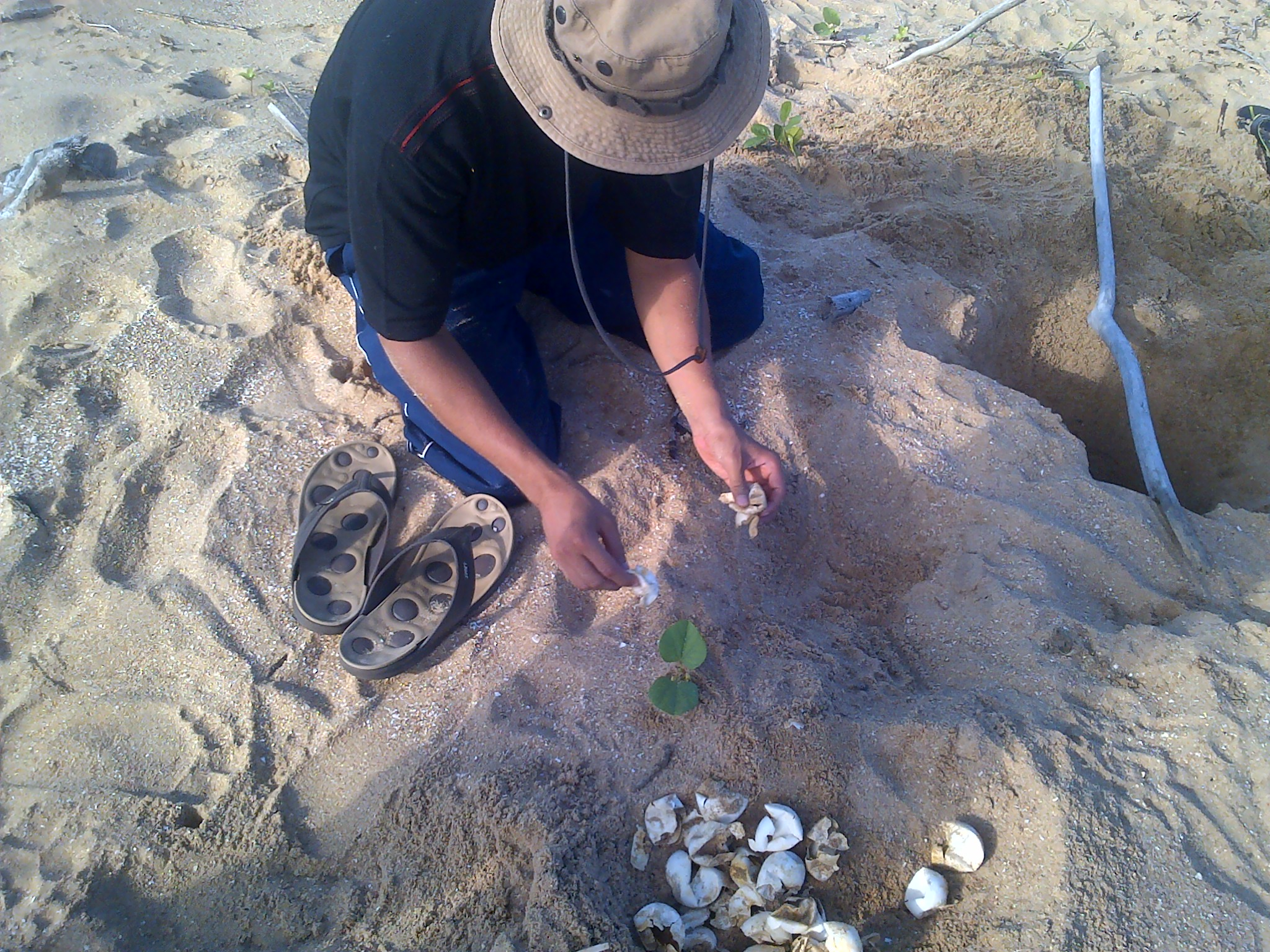 Hier worden aan nest opgravingen van de zeeschildpadden gedaan om zodoende te bepalen hoeveel eieren zijn uitgekomen.